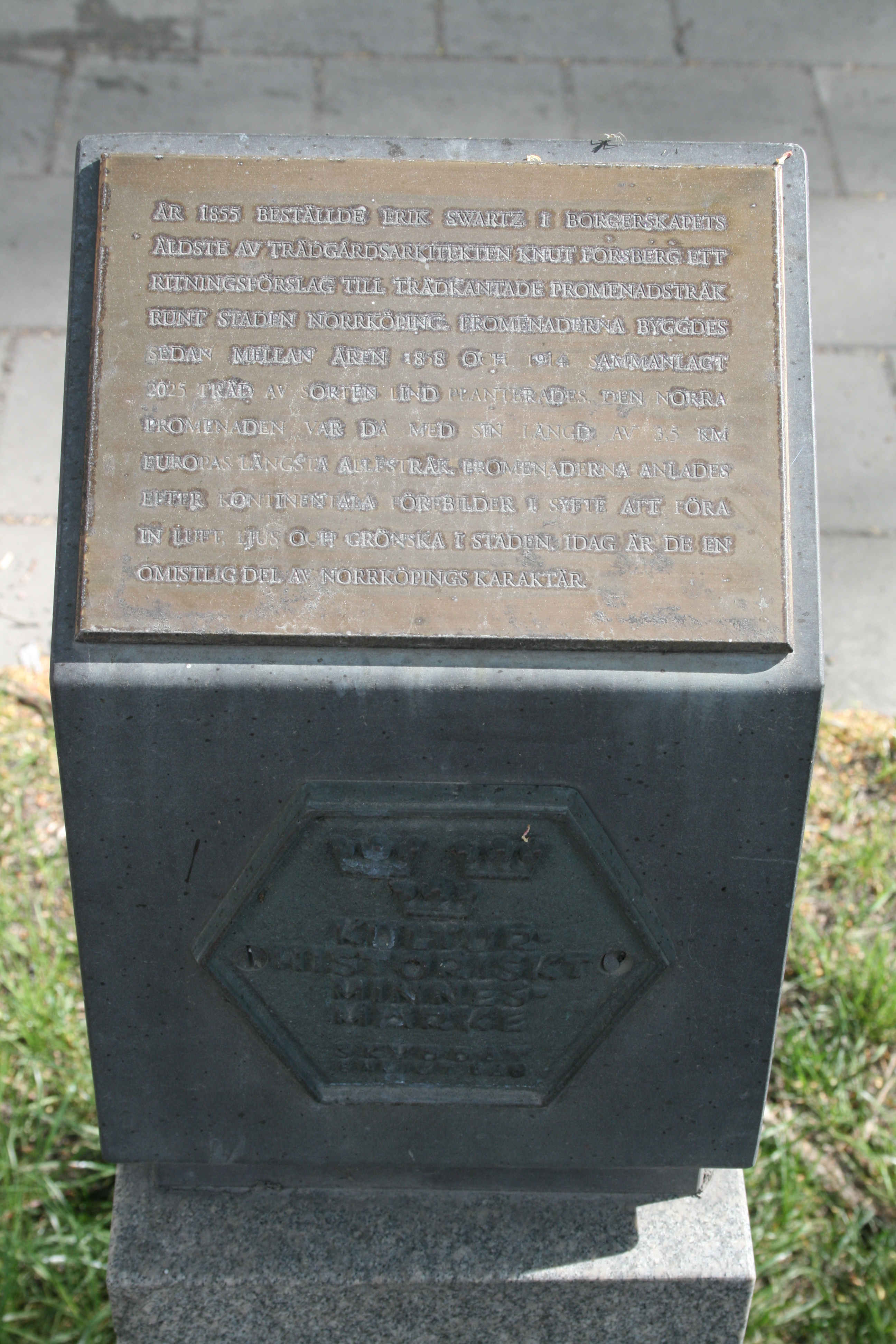 Norrköpings promenader, K-märke